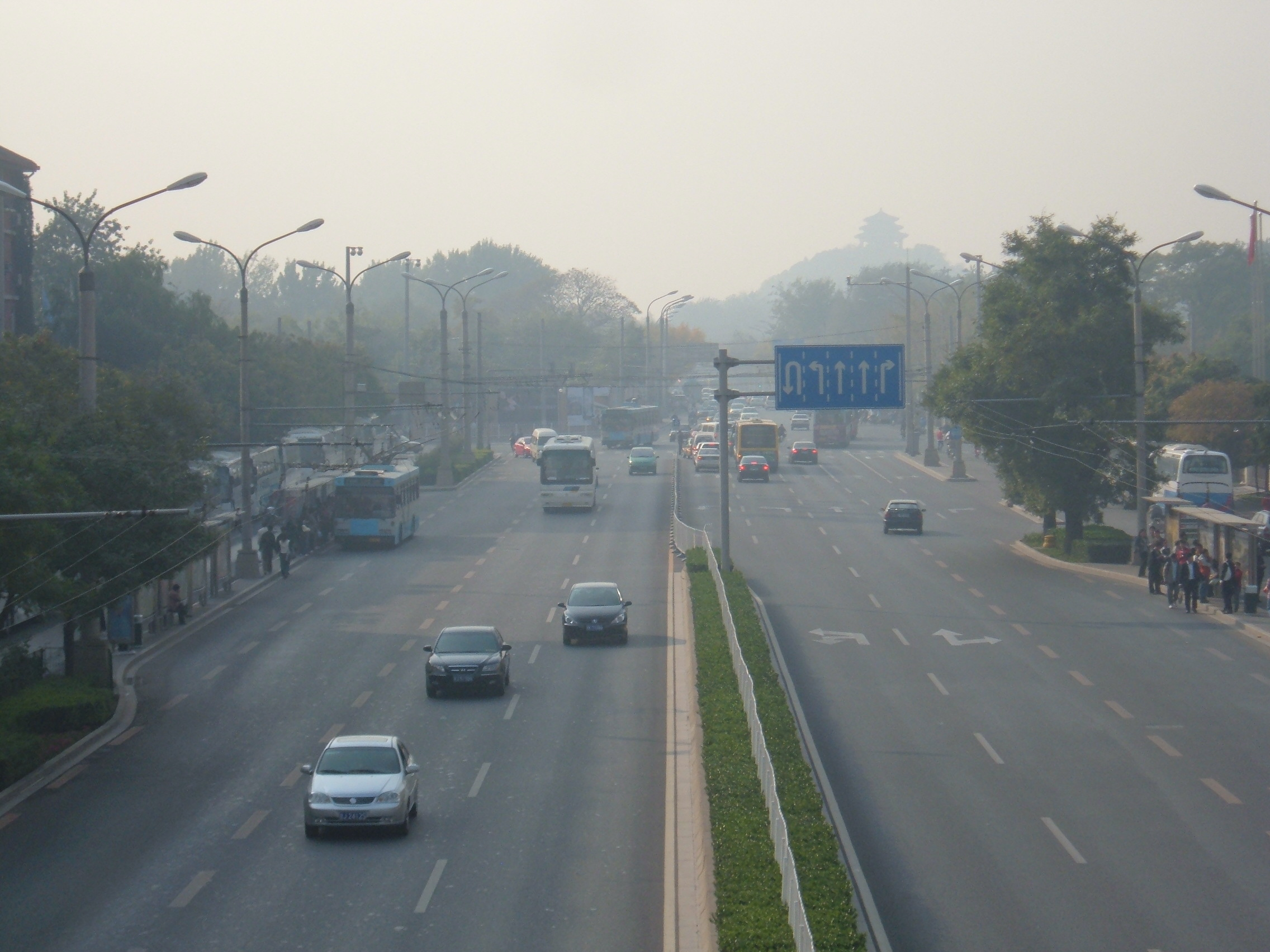 Dongsi Xi Dajie, in Beijing, PRC, as seen from a pedestrian bridge.